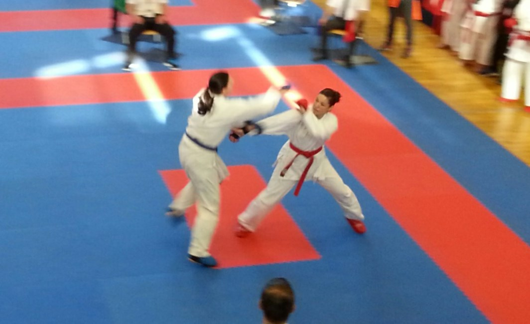 Saskia Hummel. Karate Weltmeisterin der ISKA